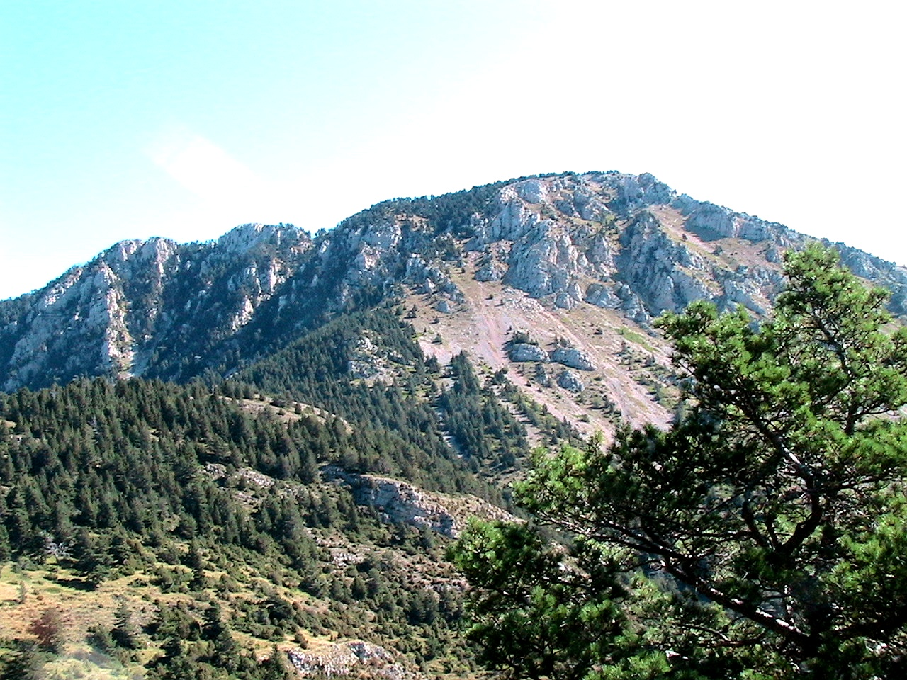 El Cap del Verd des dels Ordiars, camí del coll Virolet. La Coma i la Pedra (Solsonès - Catalunya)